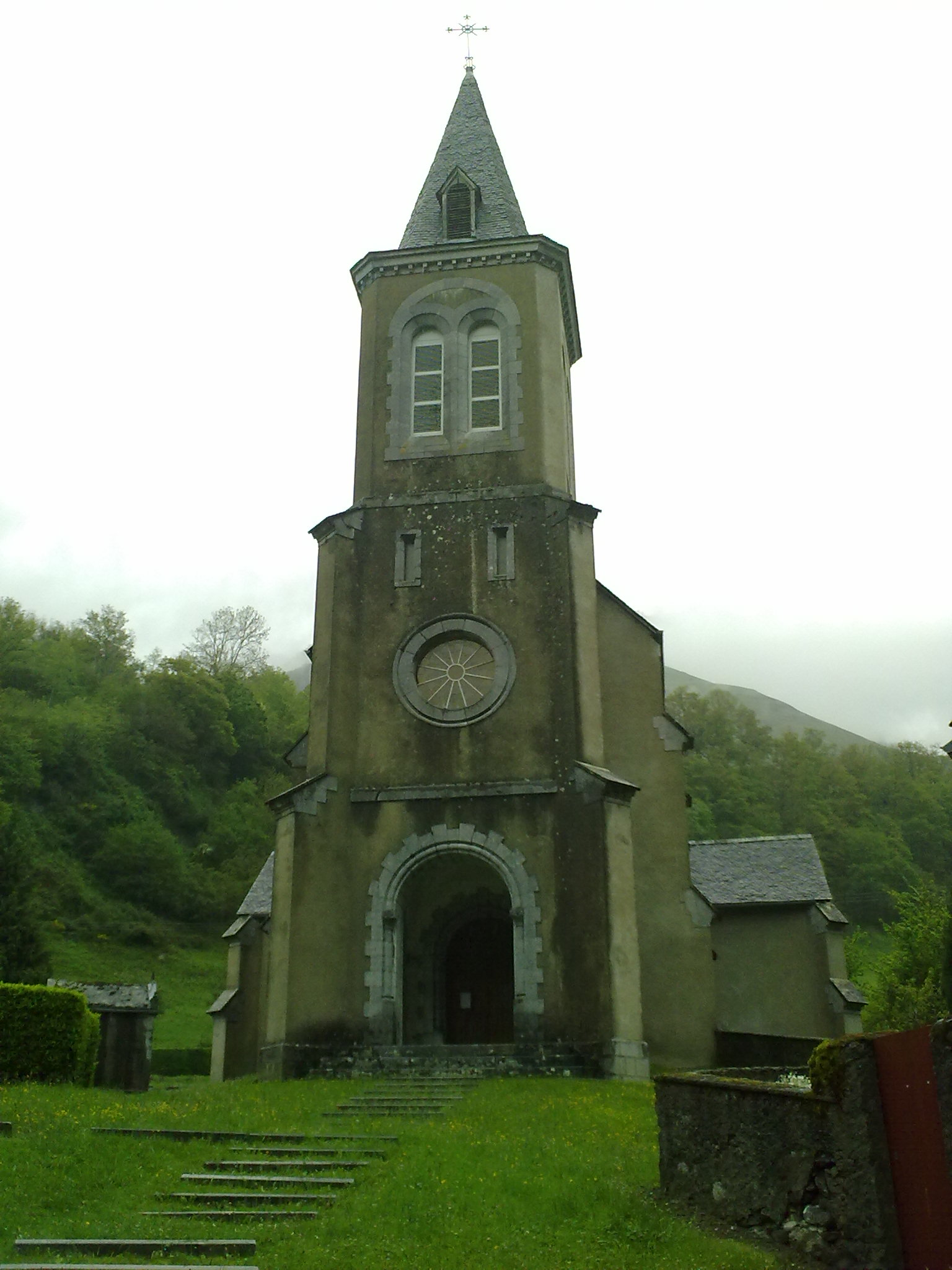 Cette-Eygun, France